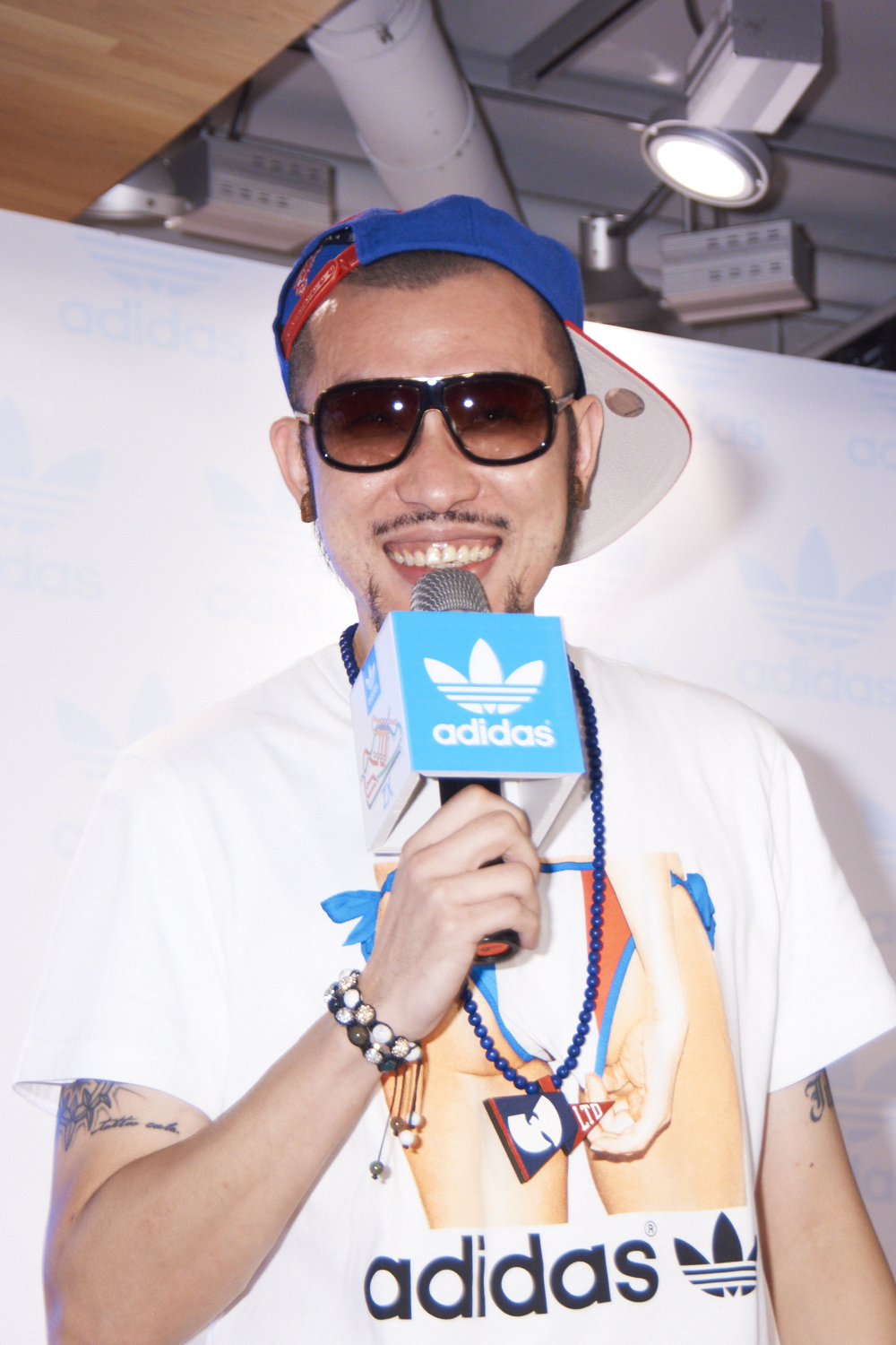 台灣藝人MC HotDog（熱狗）